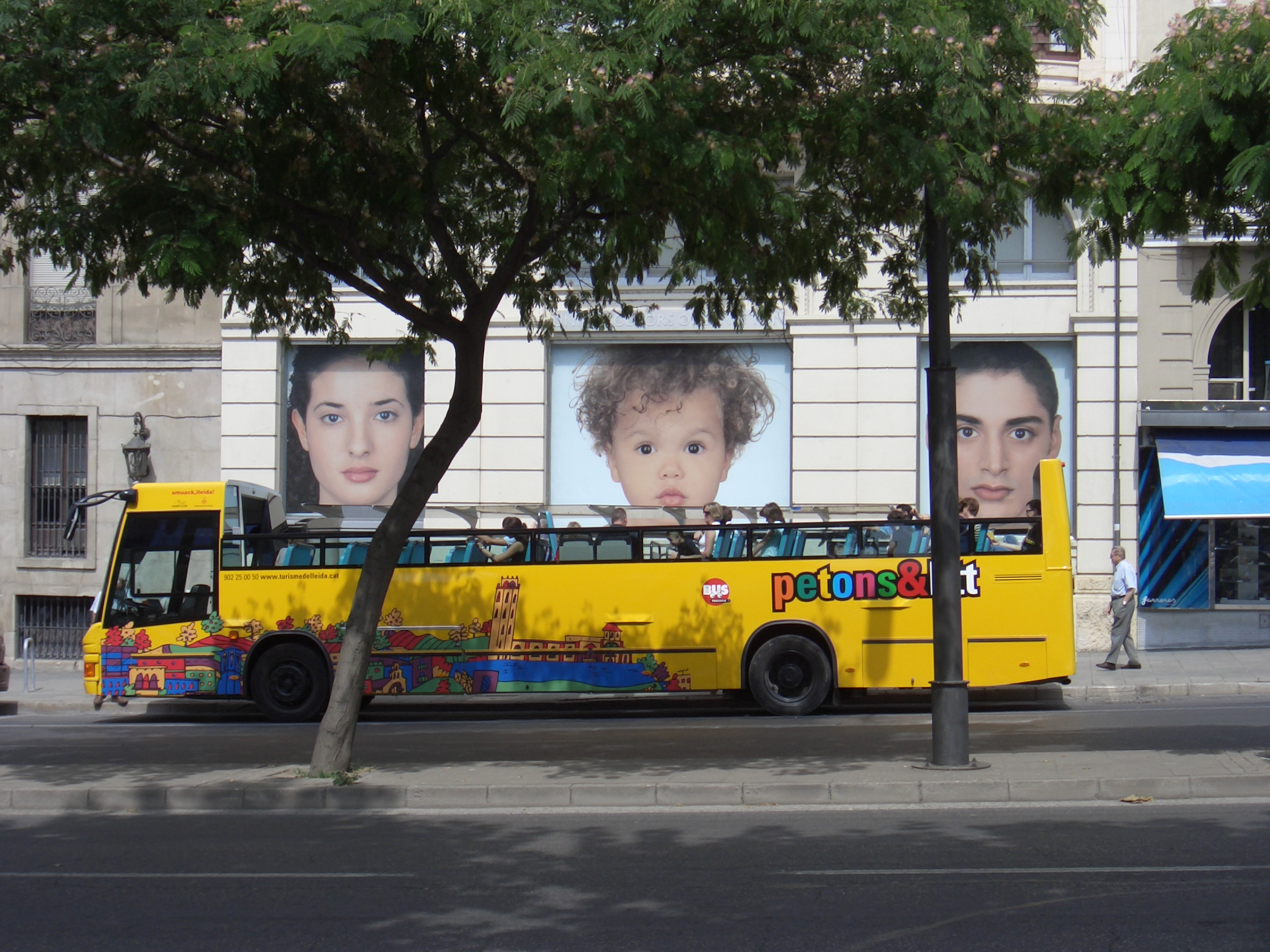 Bus Turistic de la Ciutat de Lleida model incorporat el 2007, que substitueix l'antic.